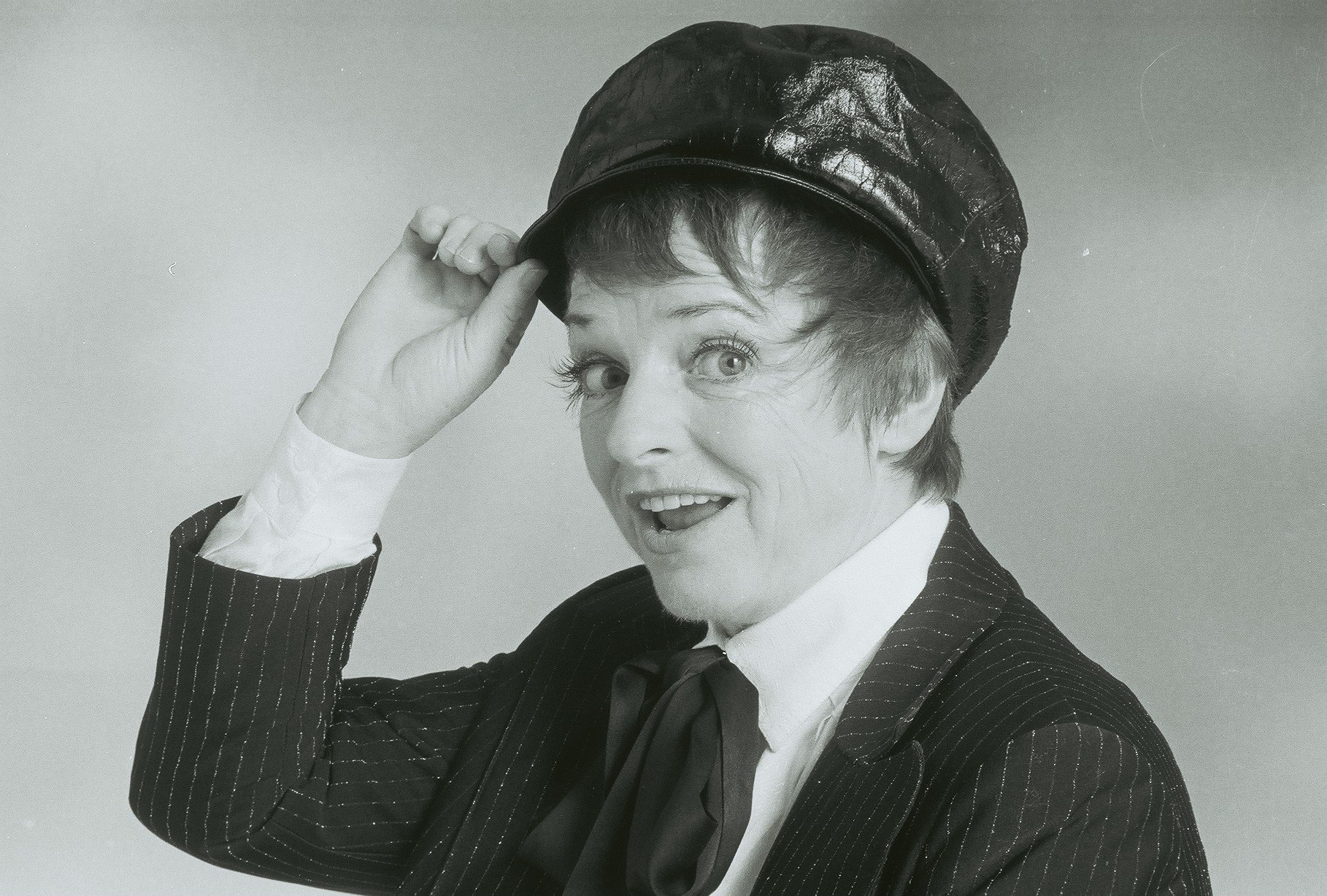 Brigitte Lebaan - Portrait